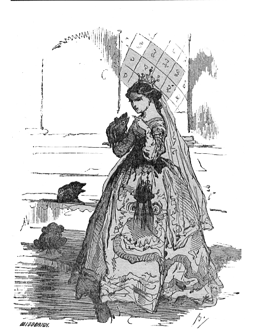 Pour la source voir : Discuter:Contes d'Andersen Vignette de Les Cygnes sauvages par Bertall représentant la princesse Élisa et les trois crapauds.